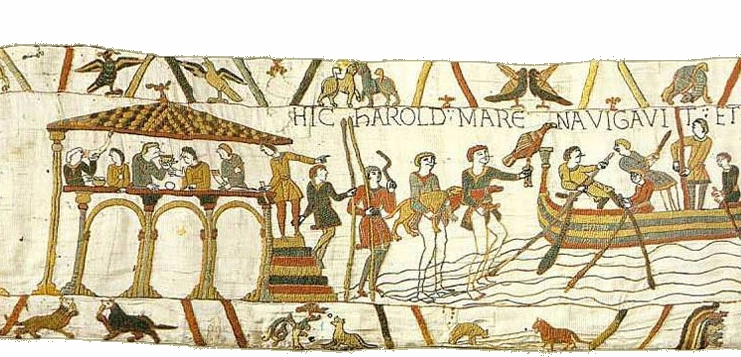 Scene 4